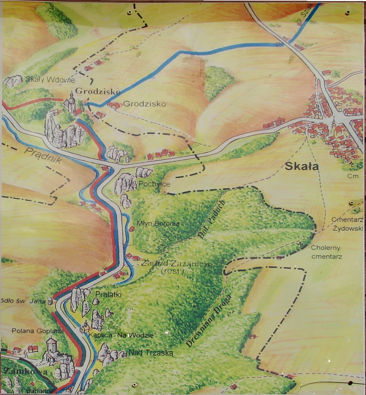 Mapa Grodziska na zachód od Skały